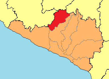 Ubicación de la Provincia de La Unión en el Departamento de Arequipa